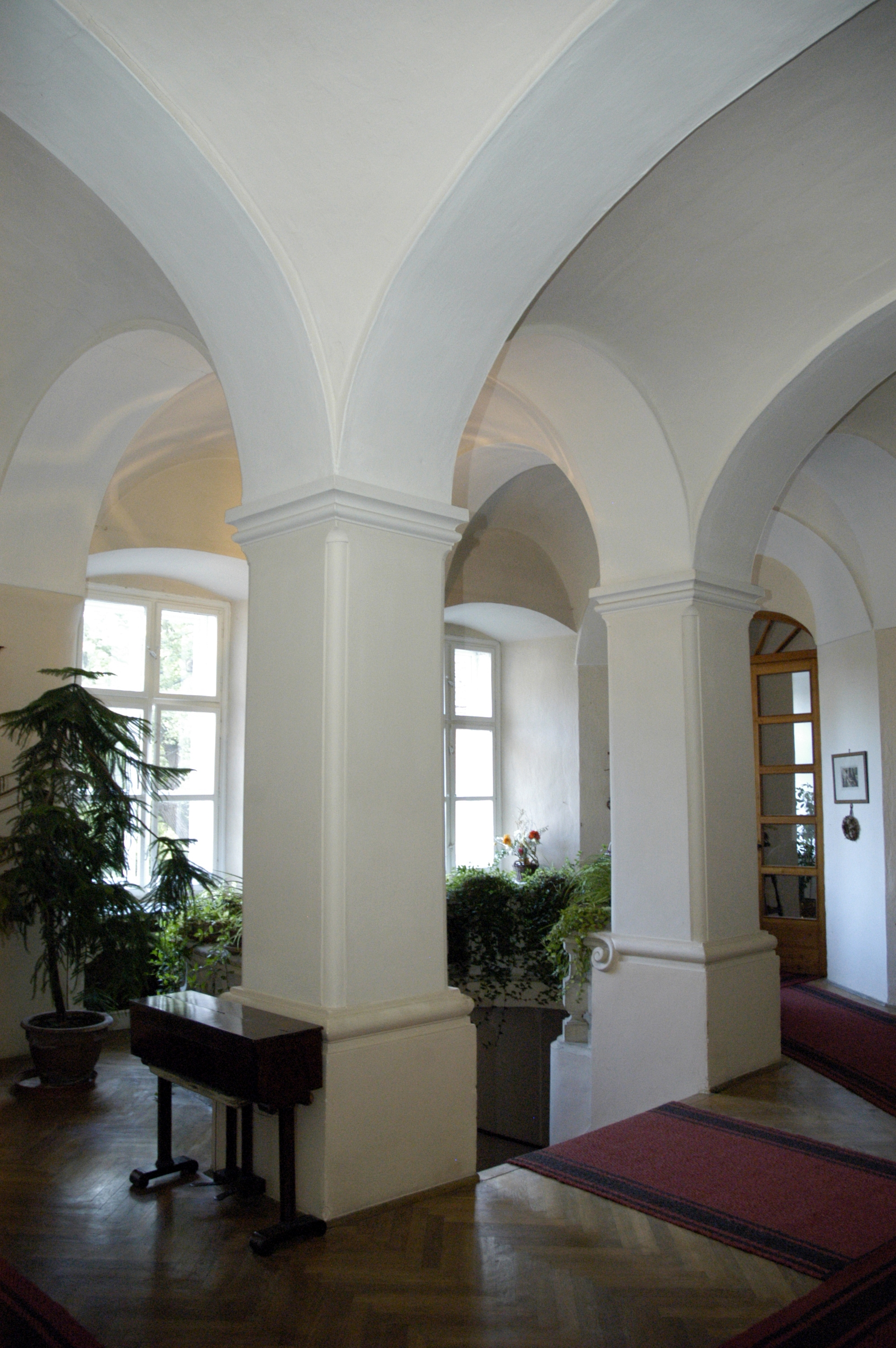 Schloss Schrattenthal Pfeilerhalle